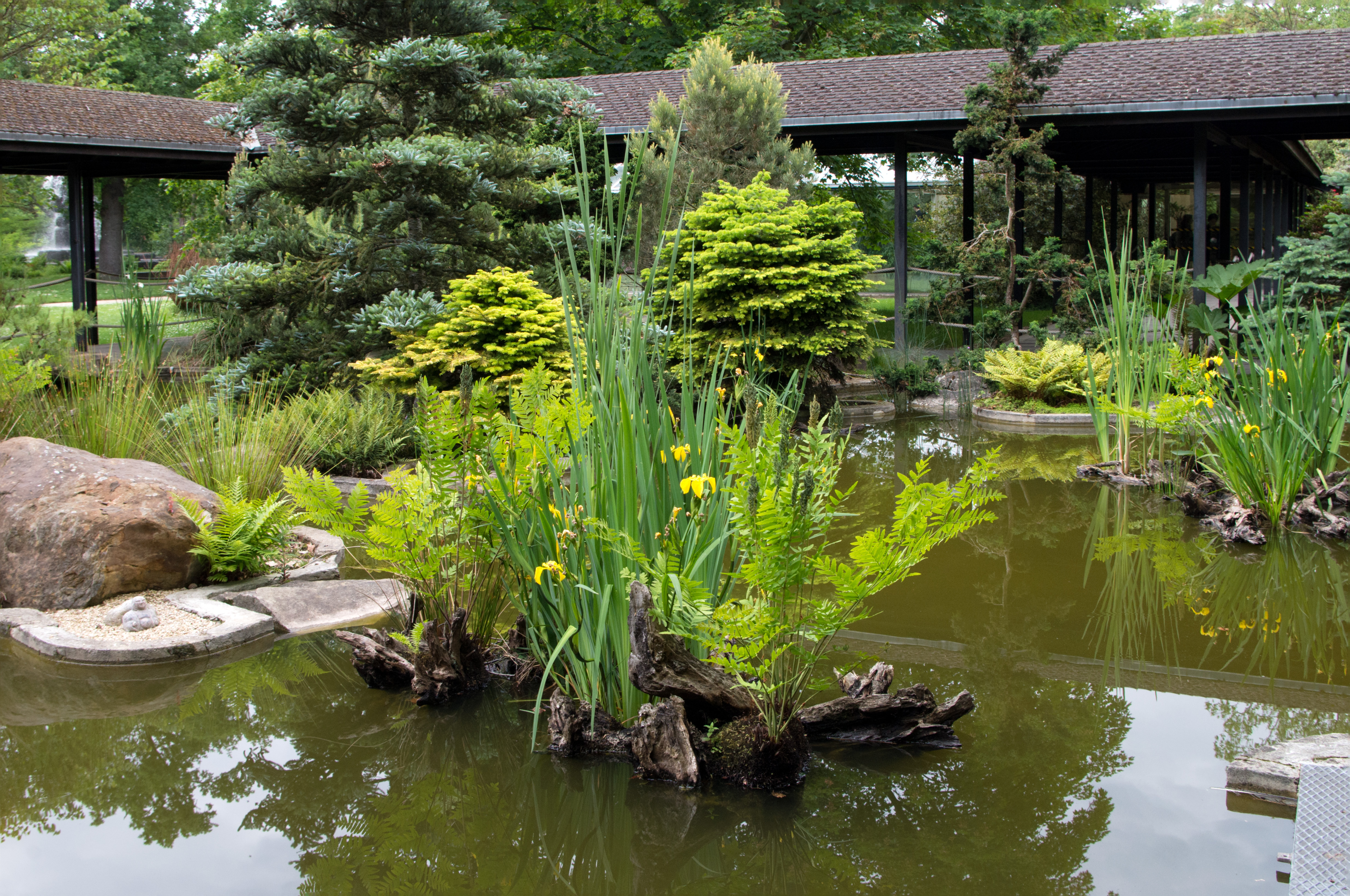 Devant un pavillon japonais du Parc Floral